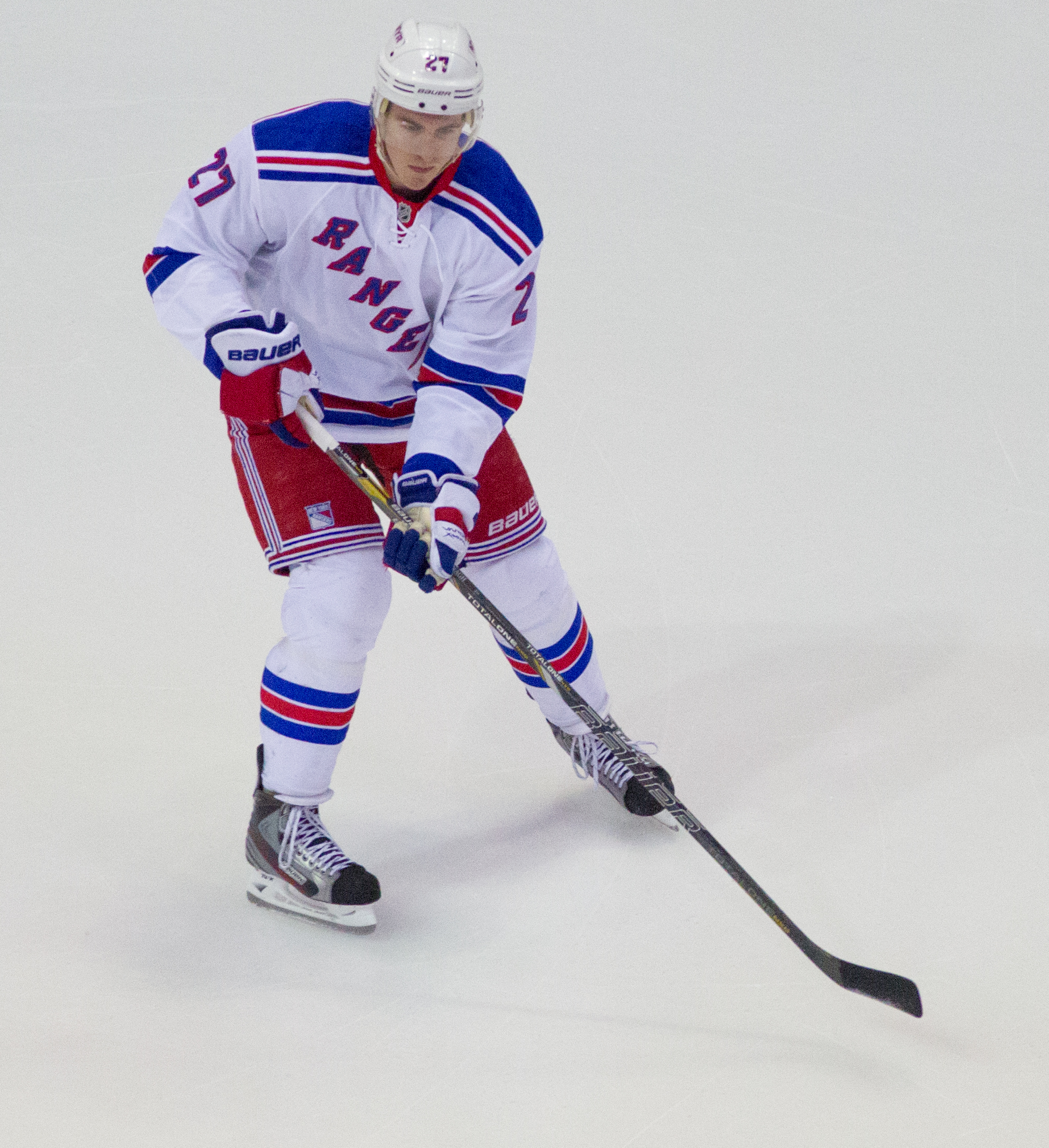 Ryan McDonagh, 03/07/2013 - Islanders vs Rangers